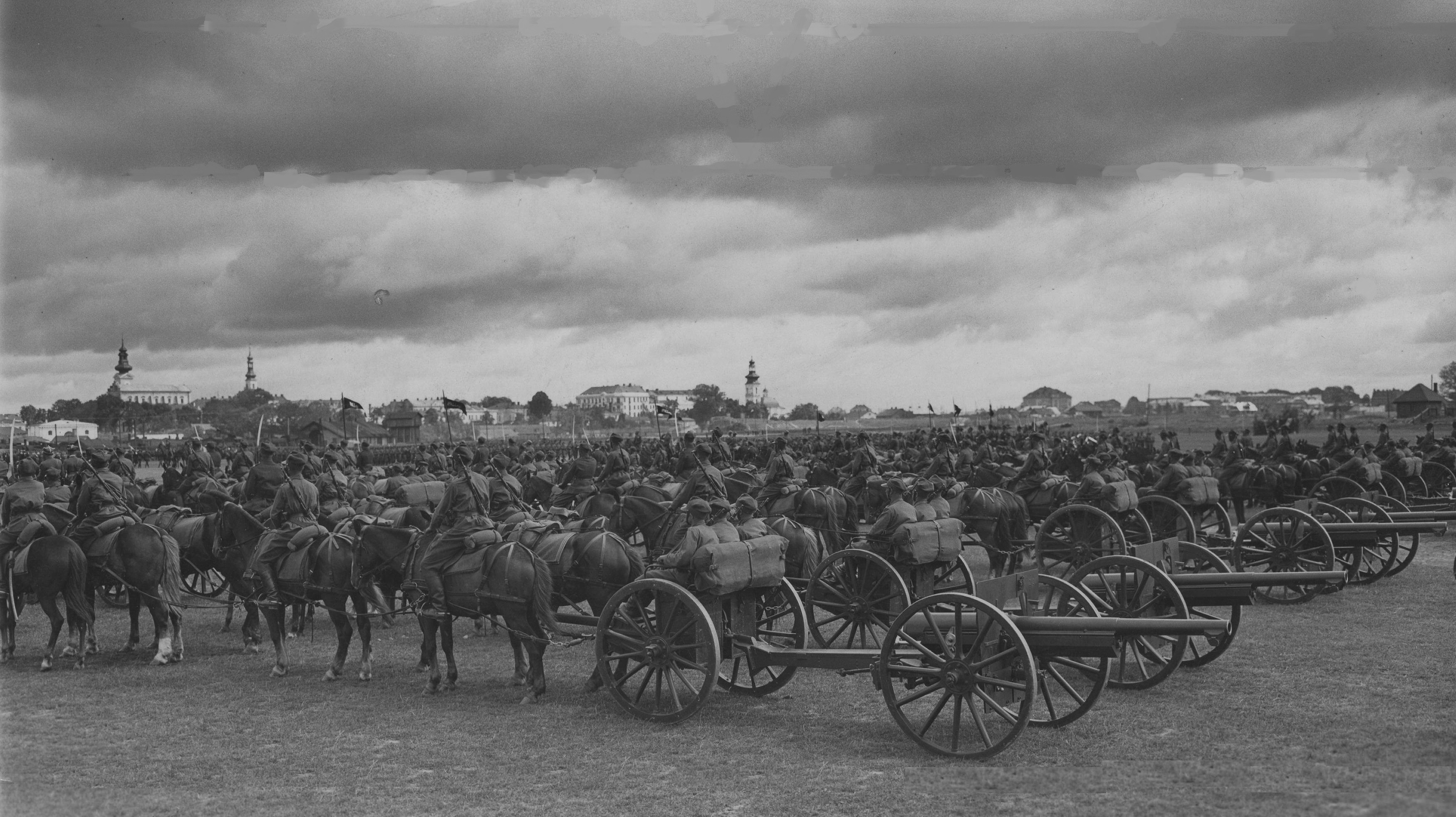 15 lecie 3 Pułku Artylerii Lekkiej Legionów. Baterie armat 75 mm wz. 97 z przodkami w trakcji konnej z 3 Pułku Artylerii Lekkiej, na tle Zamościa podczas mszy polowej, celebrowanej przez biskupa Józefa Gawlinę.